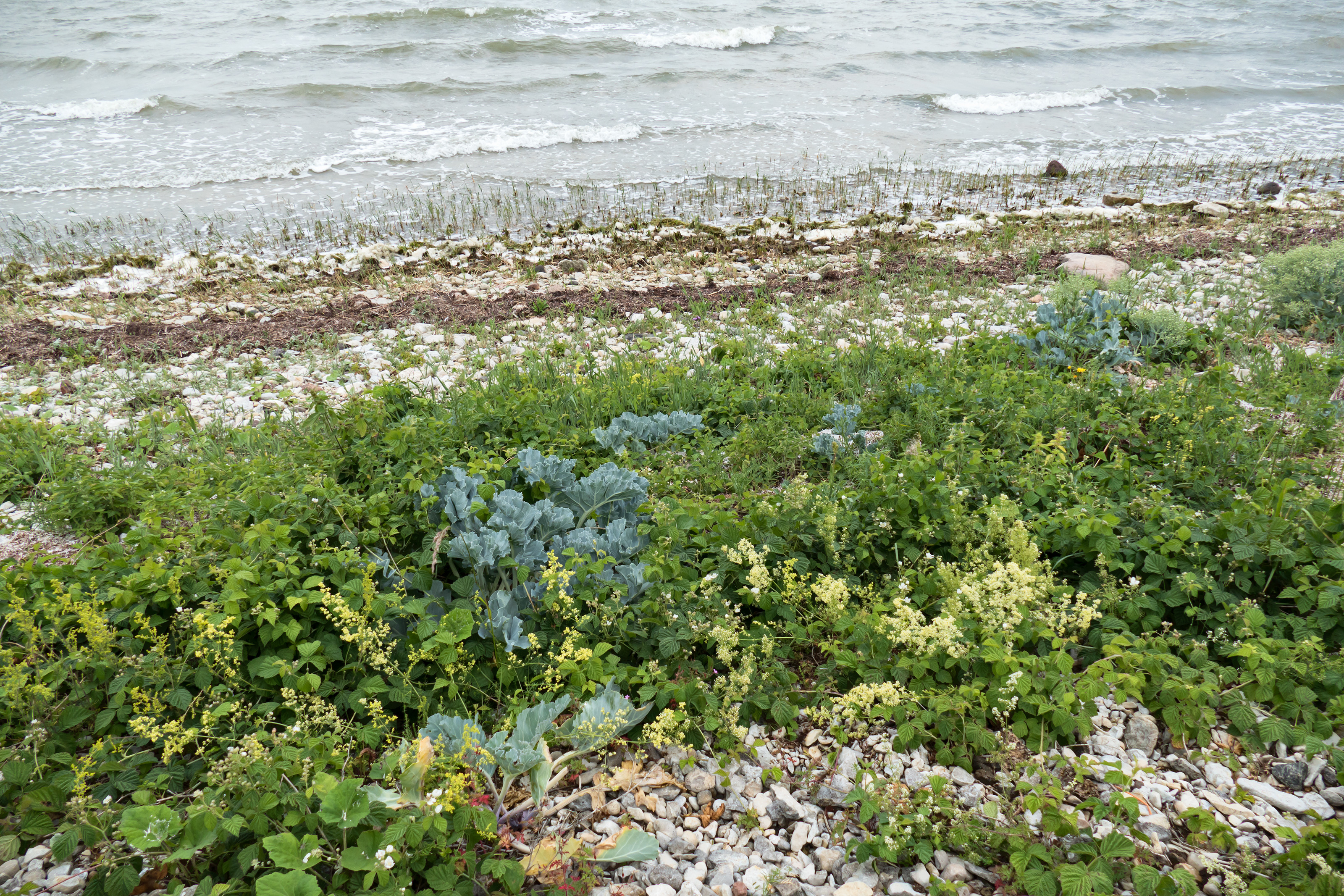 Rannataimestik Sääretirbil Hiiumaal